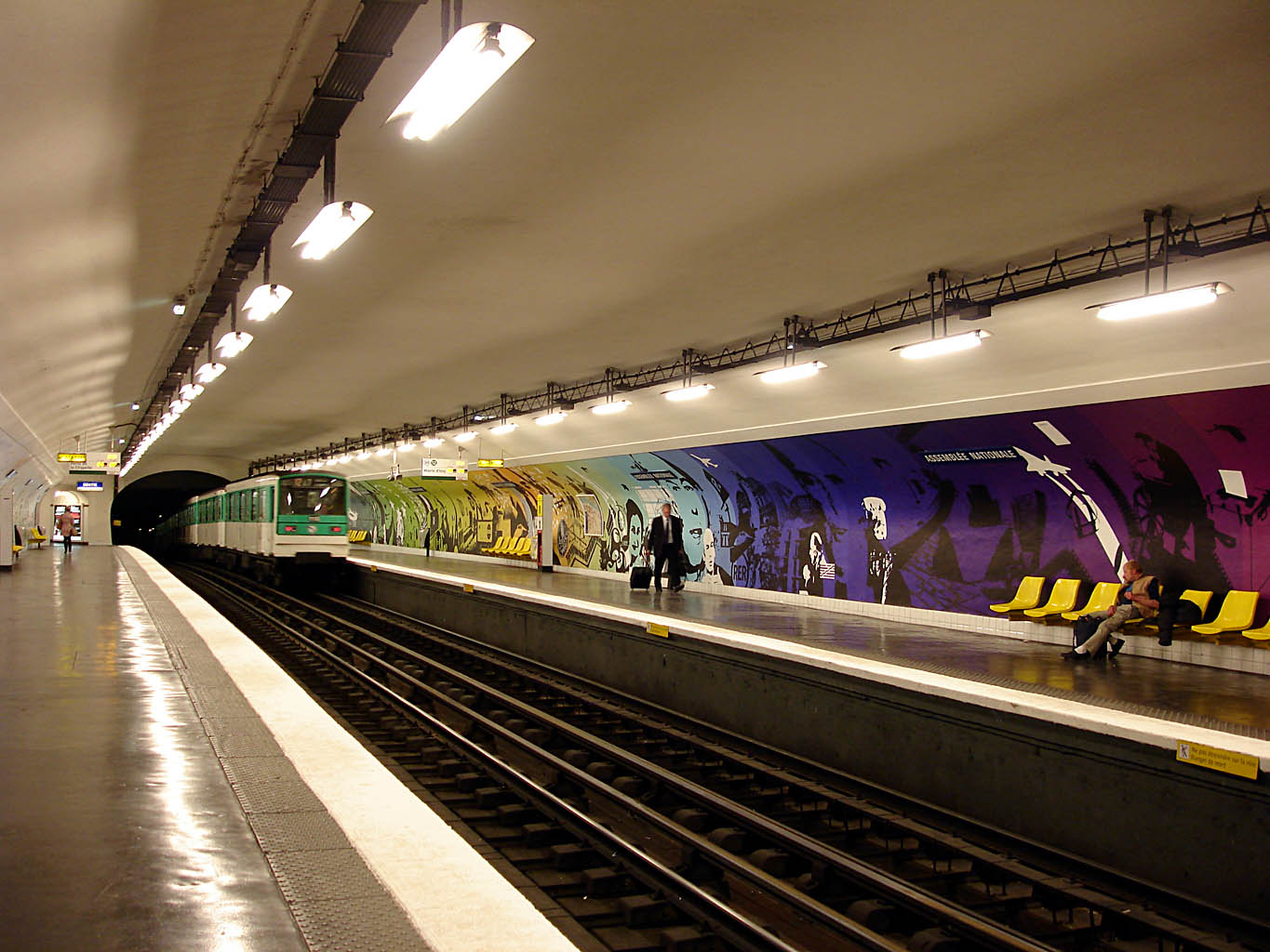 Station Assemblée nationale, de la ligne 12 du métro de Paris, France.